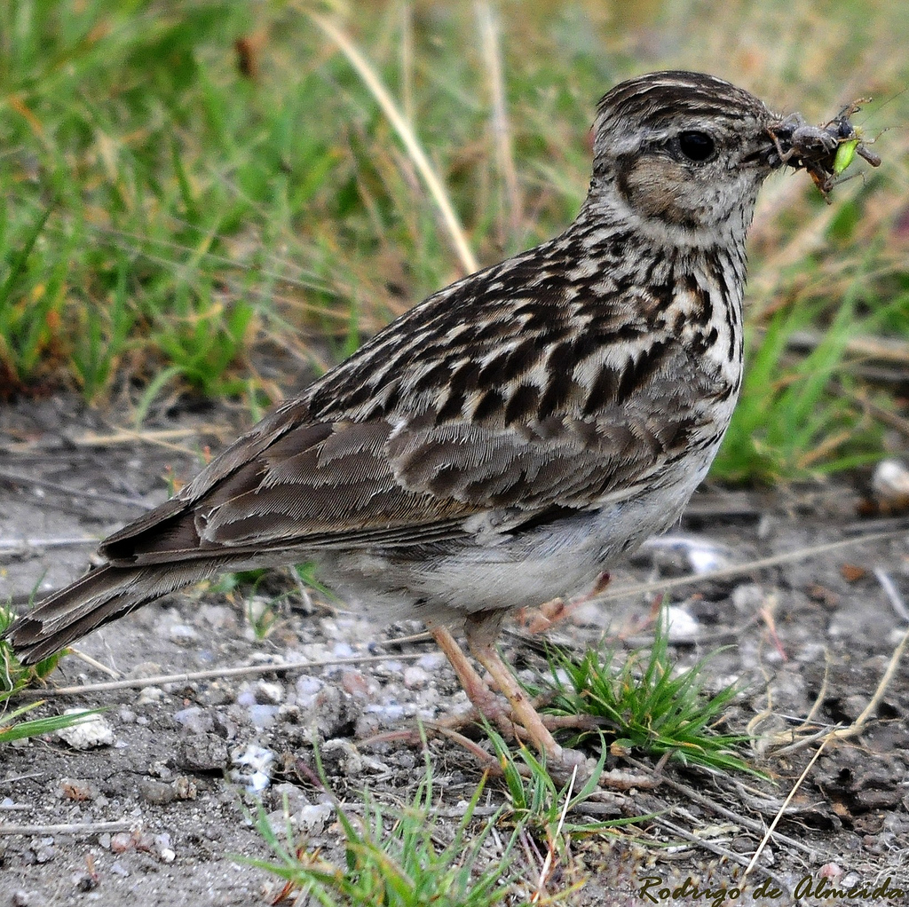 Lullula arborea